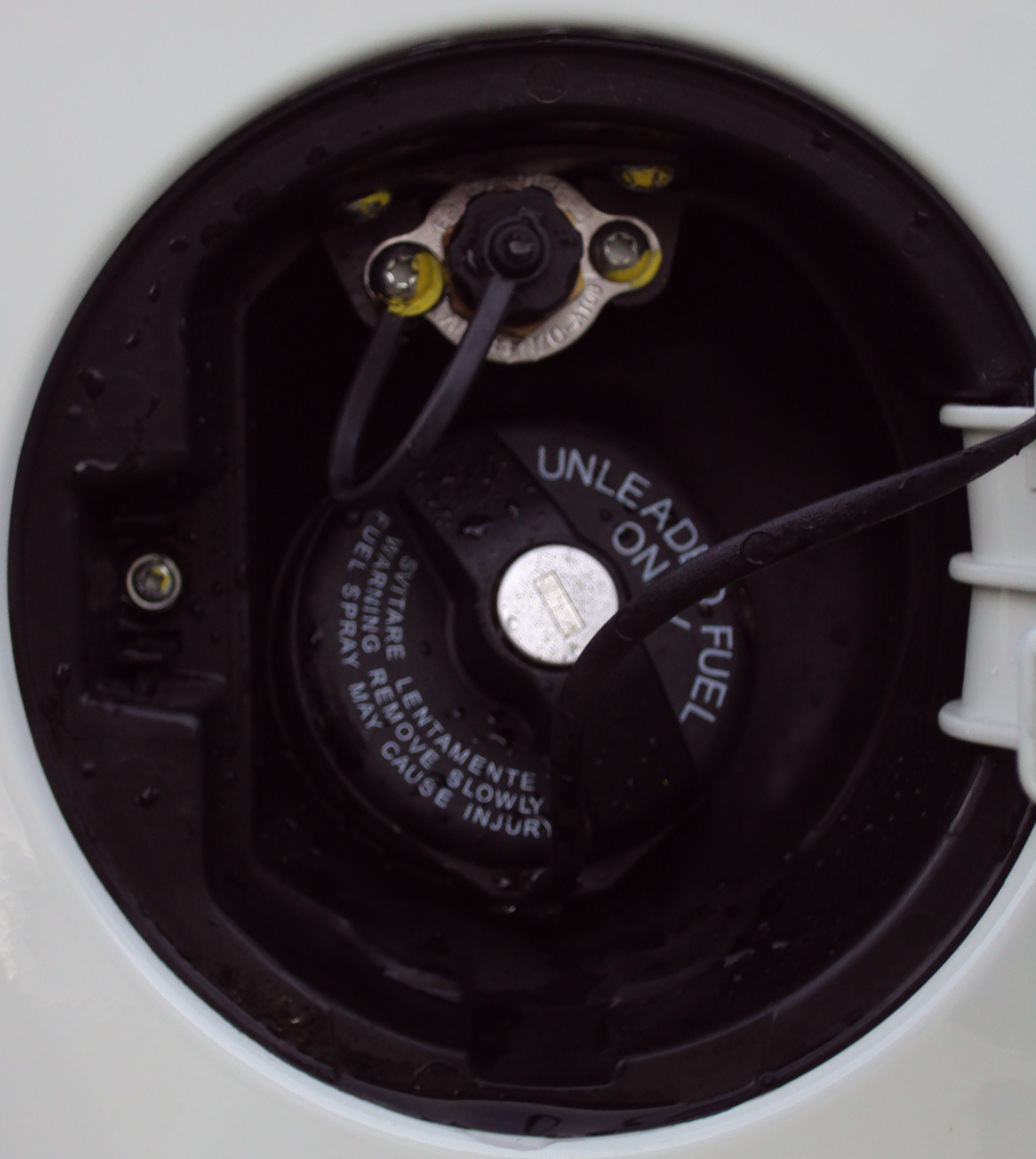 Réservoir pour 1.4l avec GPL